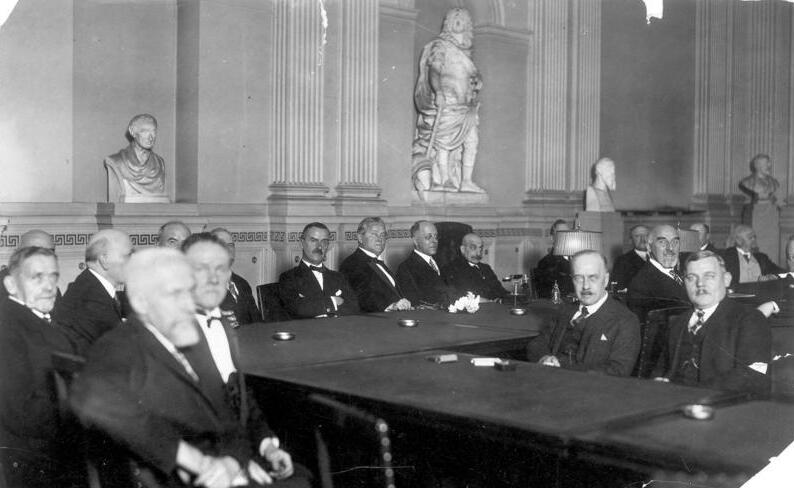 Zentralbild Die Gründung der Sektion für Dichtkunst 1926 in der Preußischen Akademie der Künste in Berlin. Von dem Präsidenten der Akademie der Künste, Prof. Max Liebermann, wurde die Sitzung der Sektion für Dichtkunst eröffnet. Am hinteren Beratungstisch von links Thomas Mann, Hermann Stehr, Minister Prof. Dr. Carl Heinrich Becker und Prof. Max Liebermann. 27 257-26